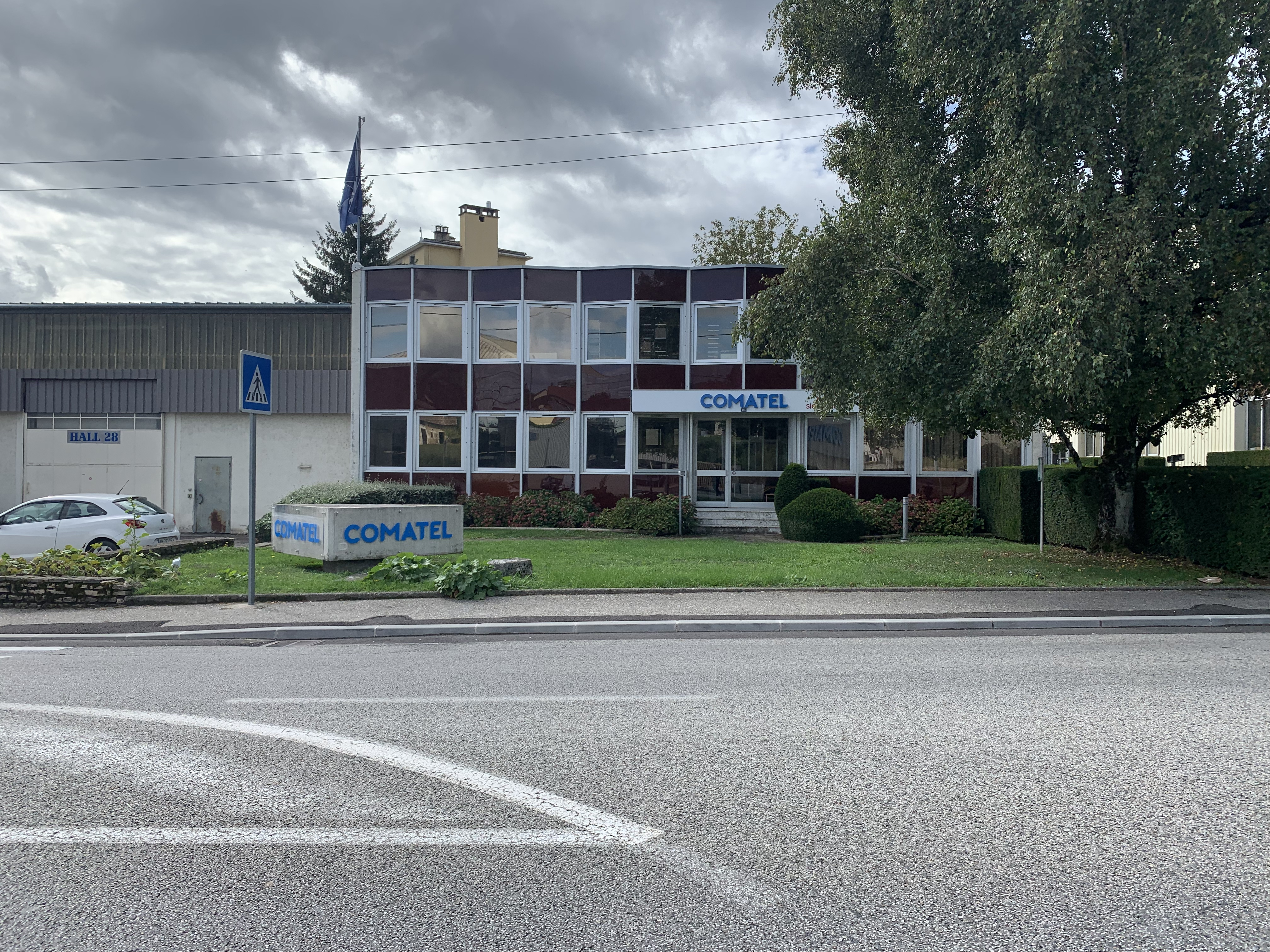 Siège de Comatel (équipementier électromécanique industriel) à Belley, avenue Charles-de-Gaulle.